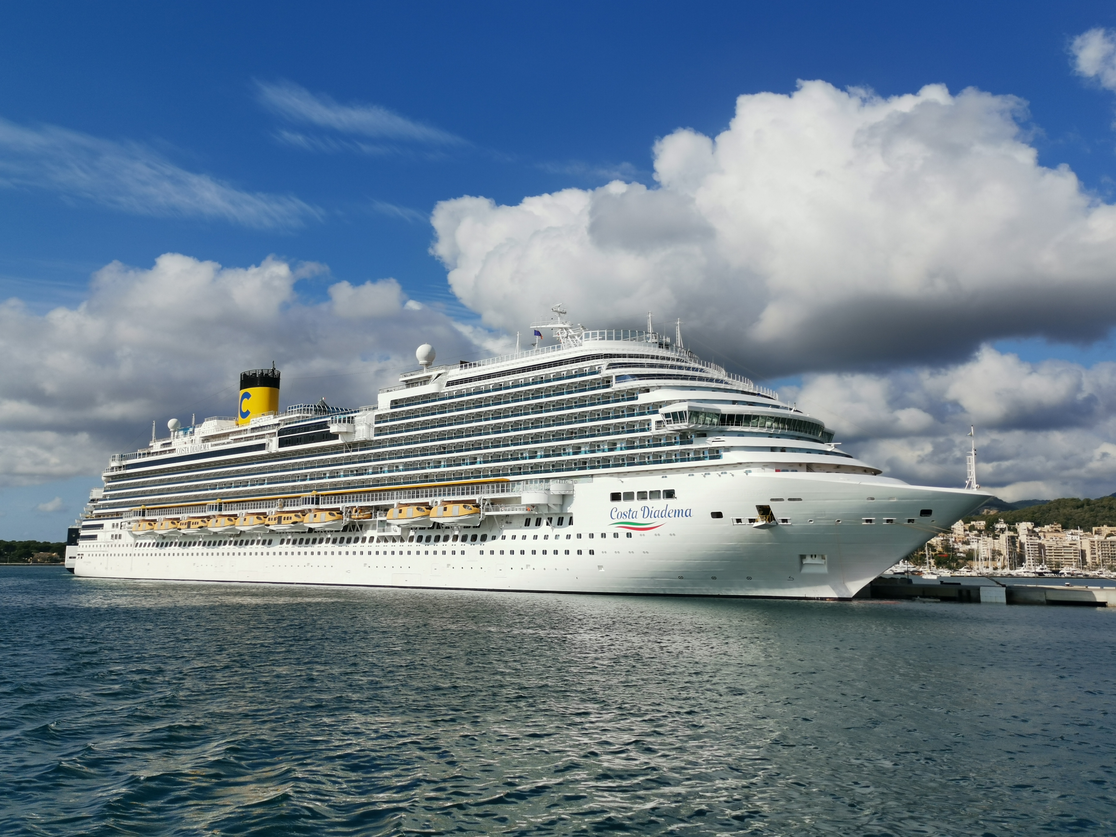 Costa Diadema im Hafen von Palma de Mallorca